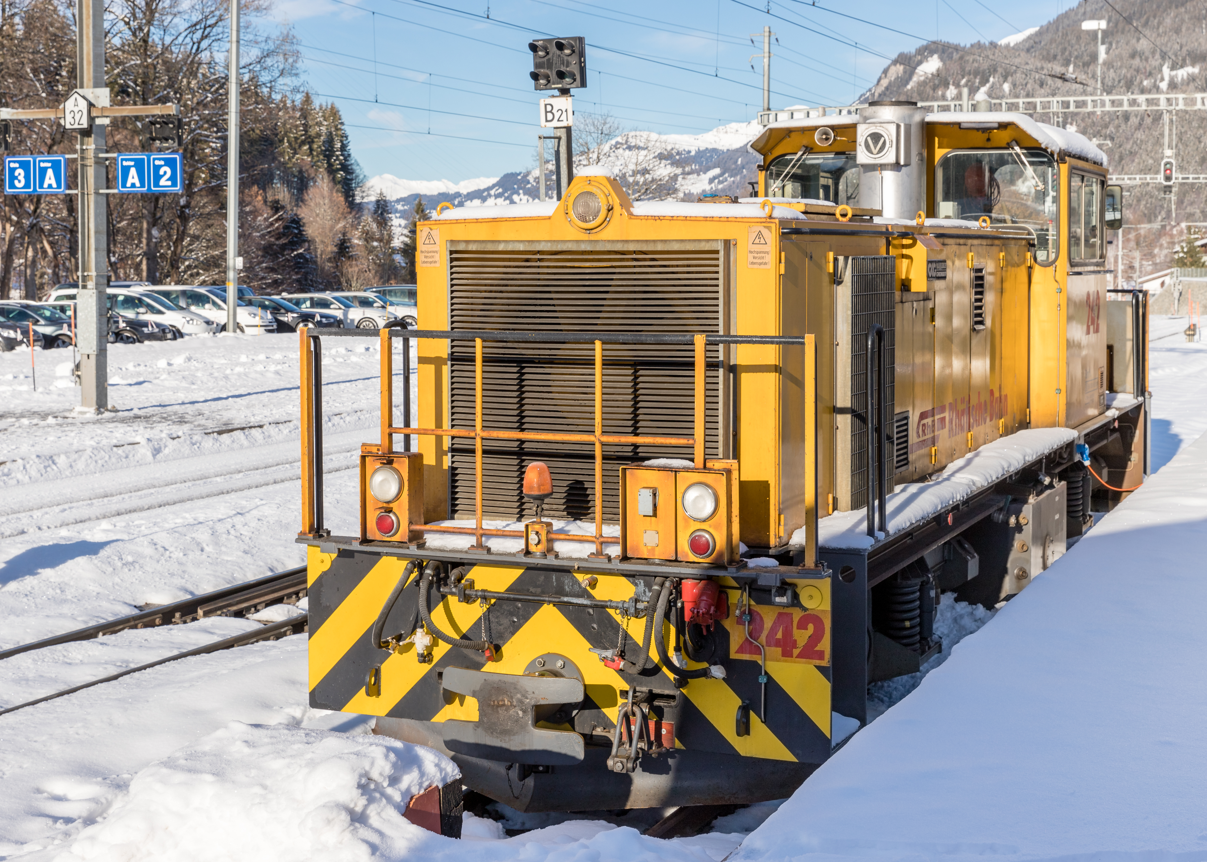 Diesellokomotive der Rhätischen Bahn (RhB) Gmf 4/4 Nr. 242 in Klosters-Platz